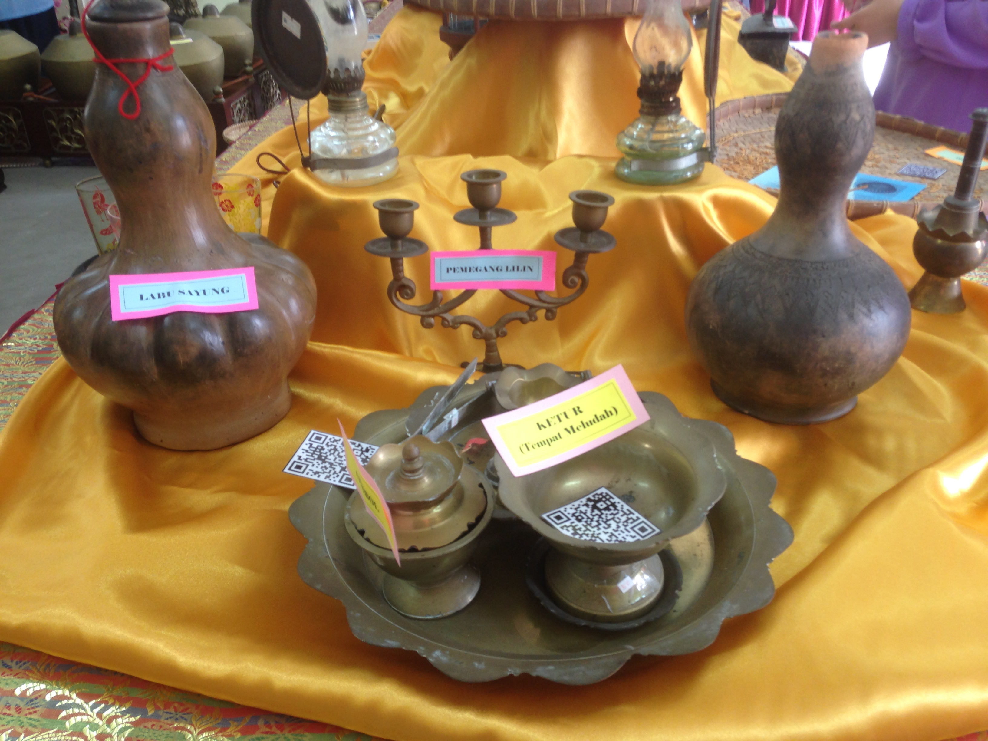 PERALATAN SEJARAH